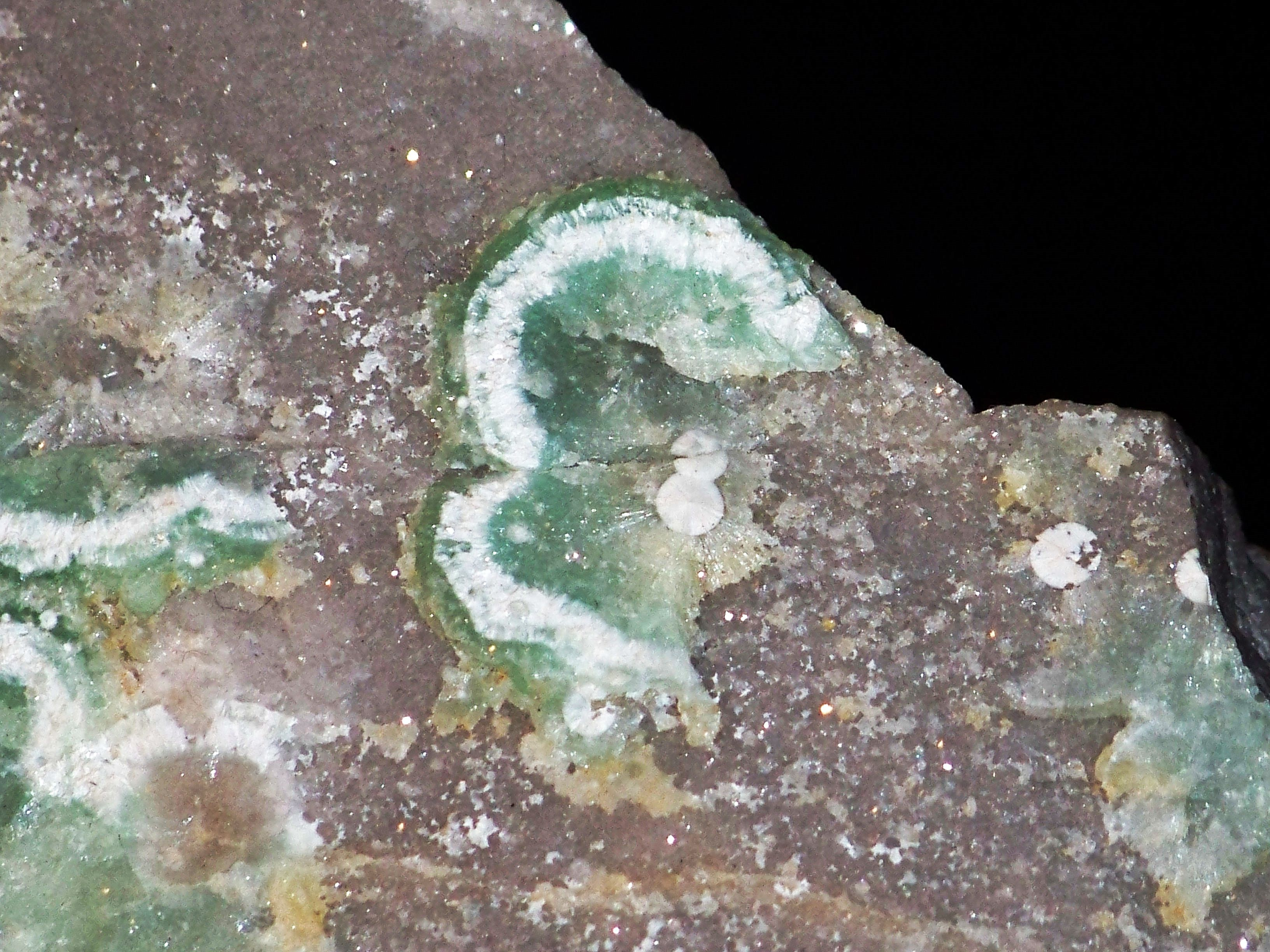 Waryscyt i wavellit z kop. Wiśniówka Duża w woj. Świętokrzyskim.